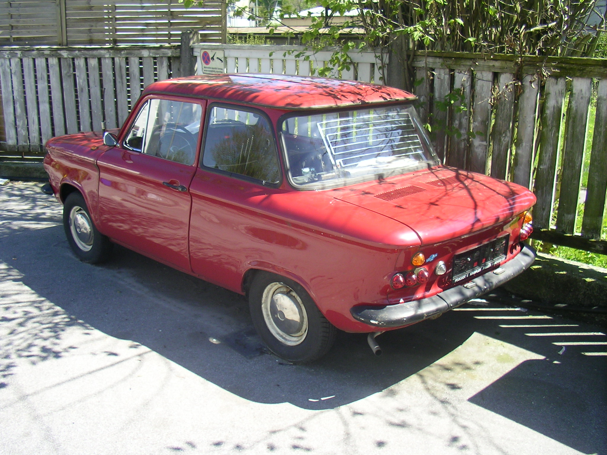 NSU Prinz IV